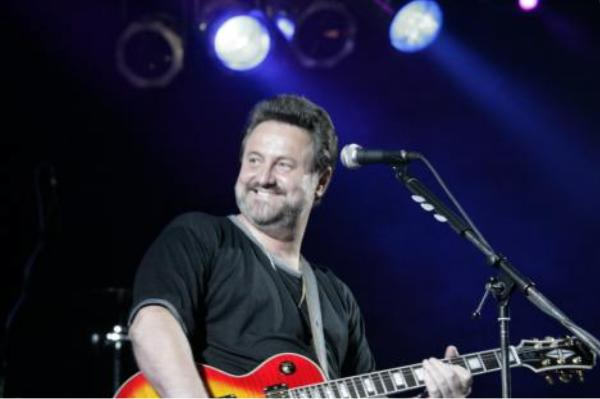 Sänger und Gitarrist Jürgen Müller